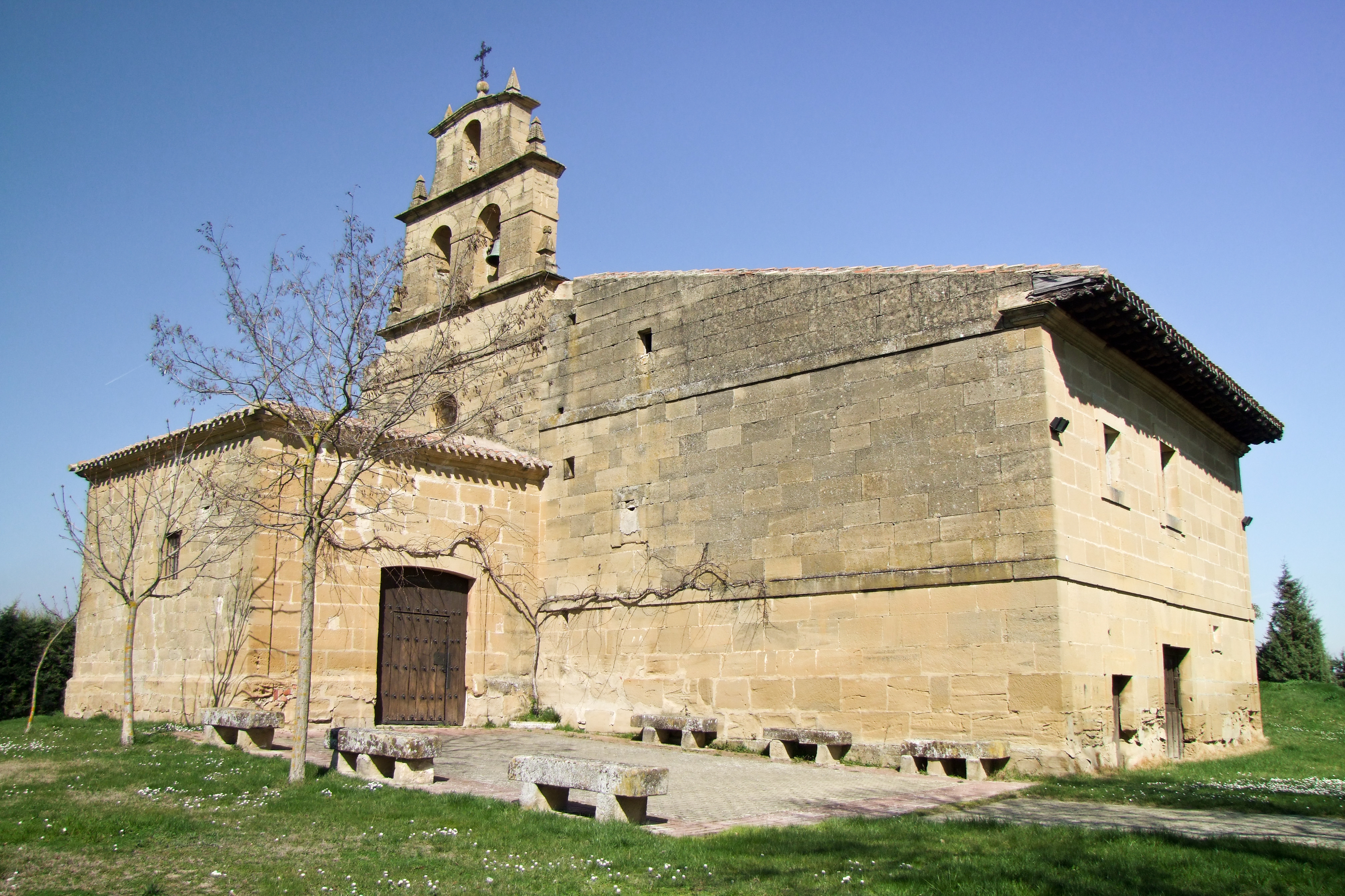 Ermita de la Junquera-Treviana-19217.jpg